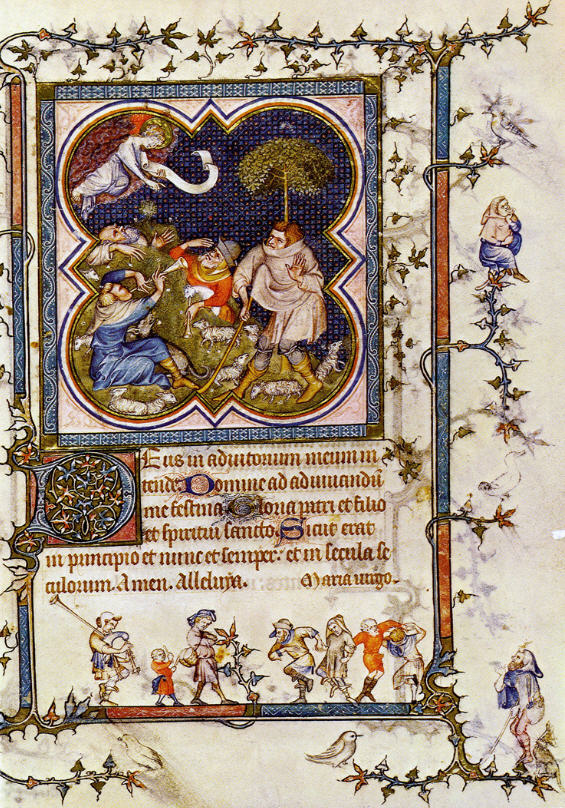 Hodinky Jany Navarrské